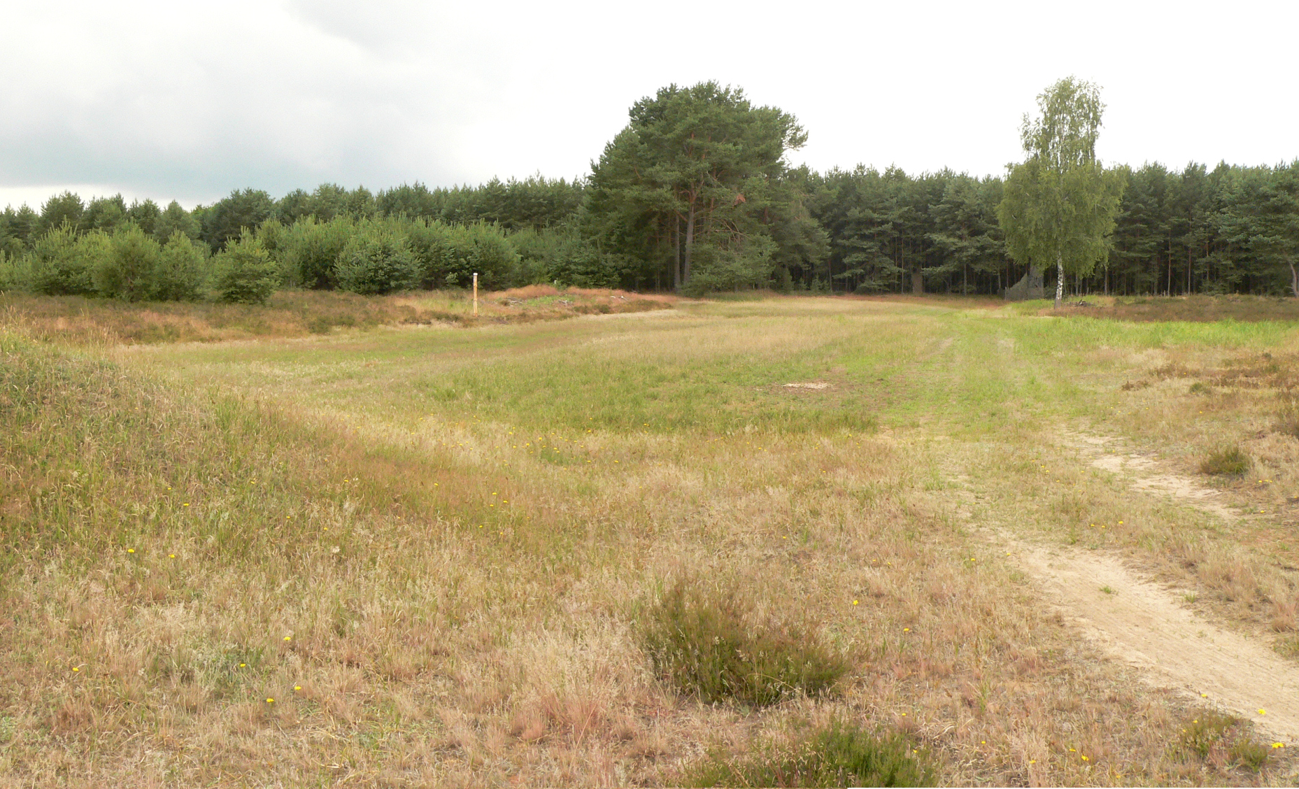 Gelände des Hüttendorfes der Republik Freies Wendland heute